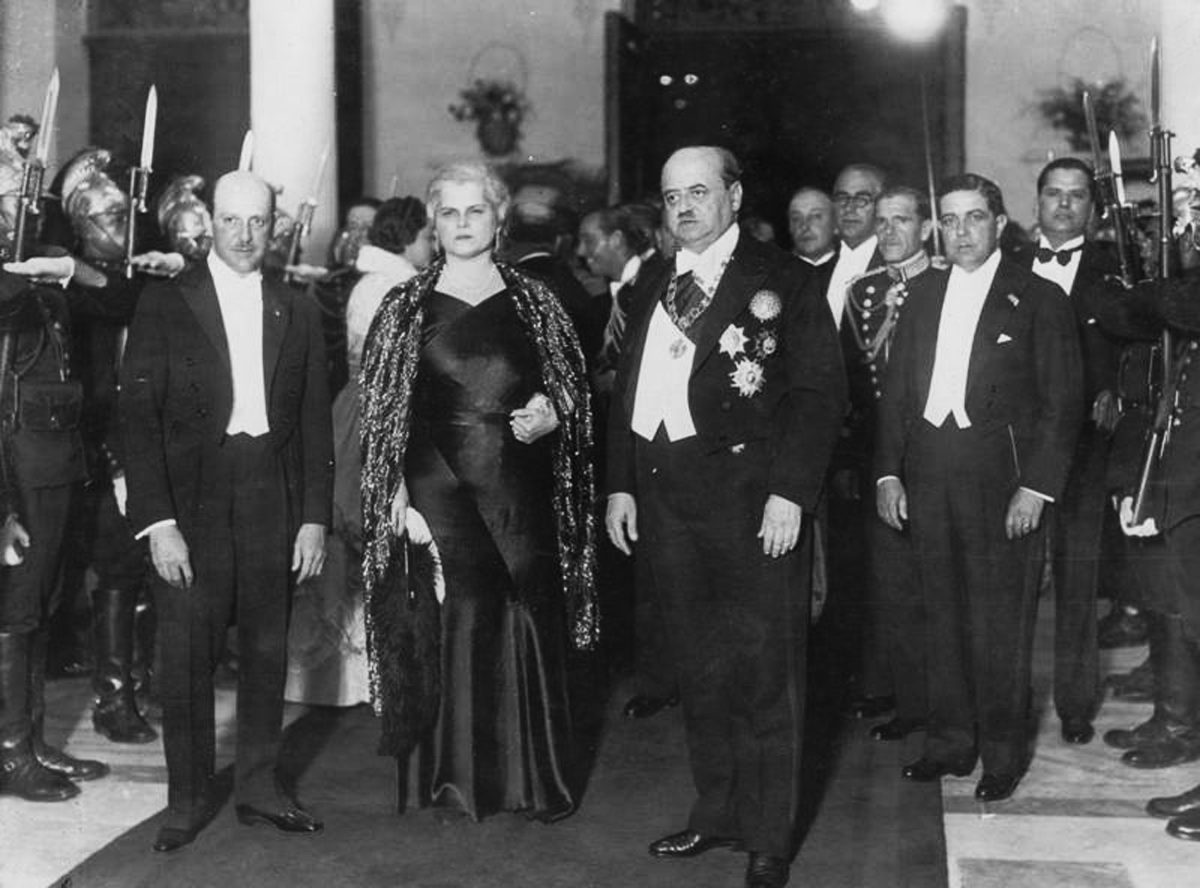 Oscar R. Benavides y esposa Francisca Diezcanseco "la Patita"